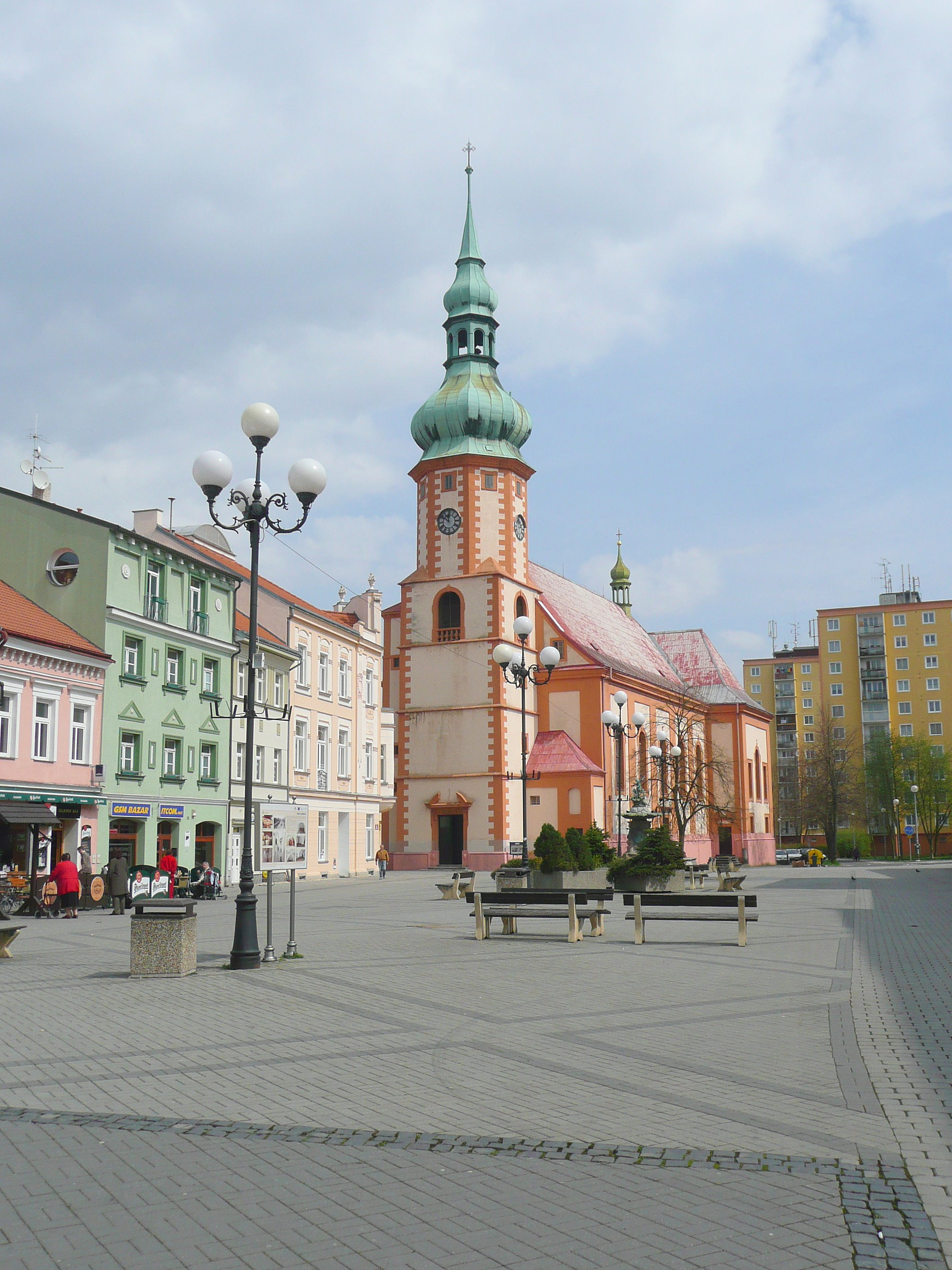 Česky: Farní kostel sv.Jakuba Většího v Sokolově na Starém náměstí